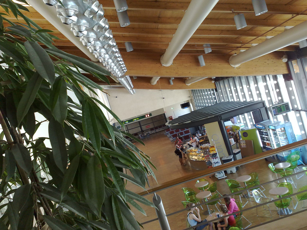 Aeroporto Antonio Canova di Treviso, particolare sala attesa